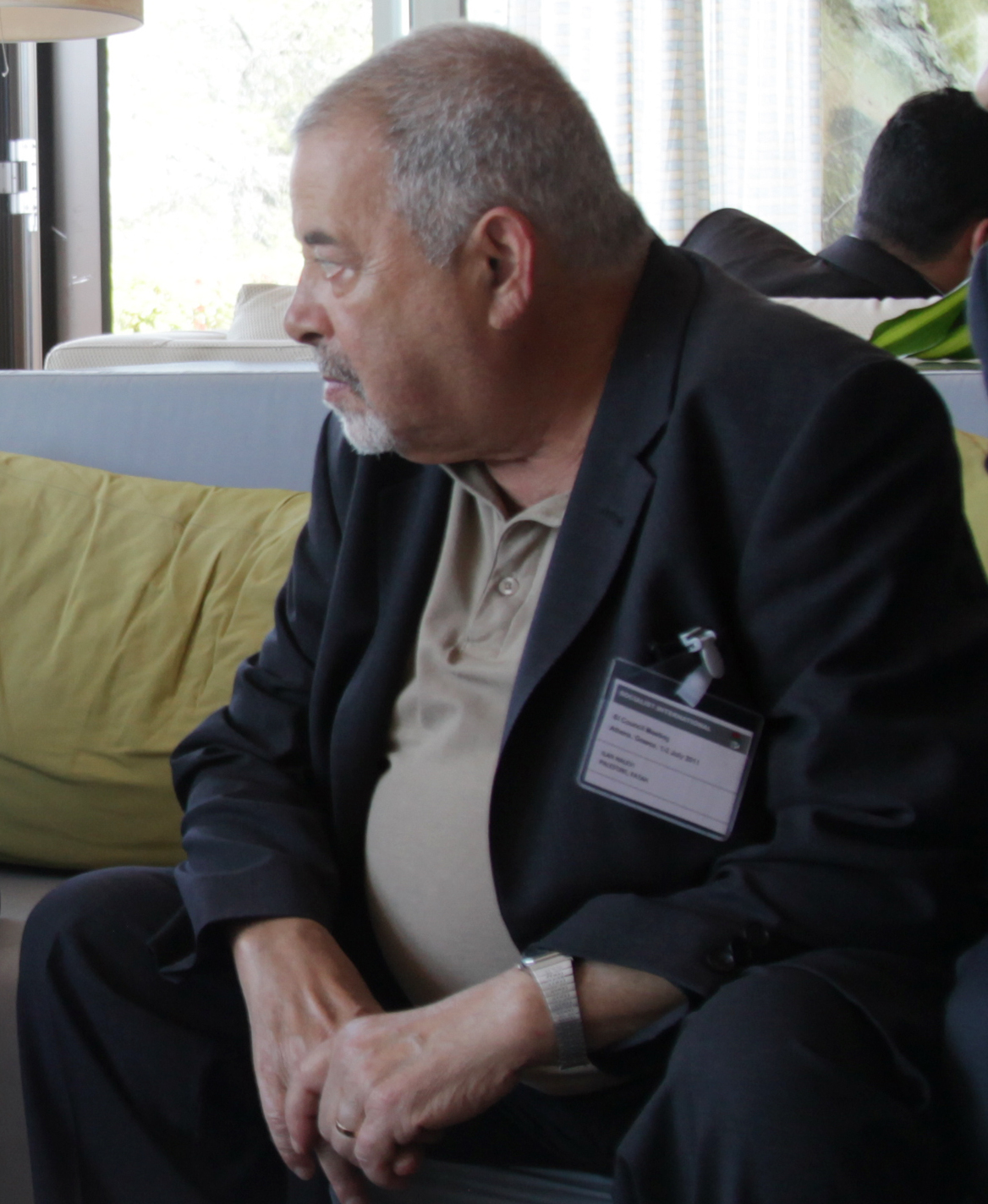 Συνάντηση με τους Παλαιστίνιους, Nabeel Shaath, Μέλος της Κεντρικής Επιτροπής της Φατάχ και Υπεύθυνο Εξωτερικών Σχέσεων, τον Ilan Halevi και τον Moustafa Ajouz (Συμβούλιο Σοσιαλιστικής Διεθνούς) Ξενοδοχείο "Astir Palace", Βουλιαγμένη 2 Ιουλίου, 2011